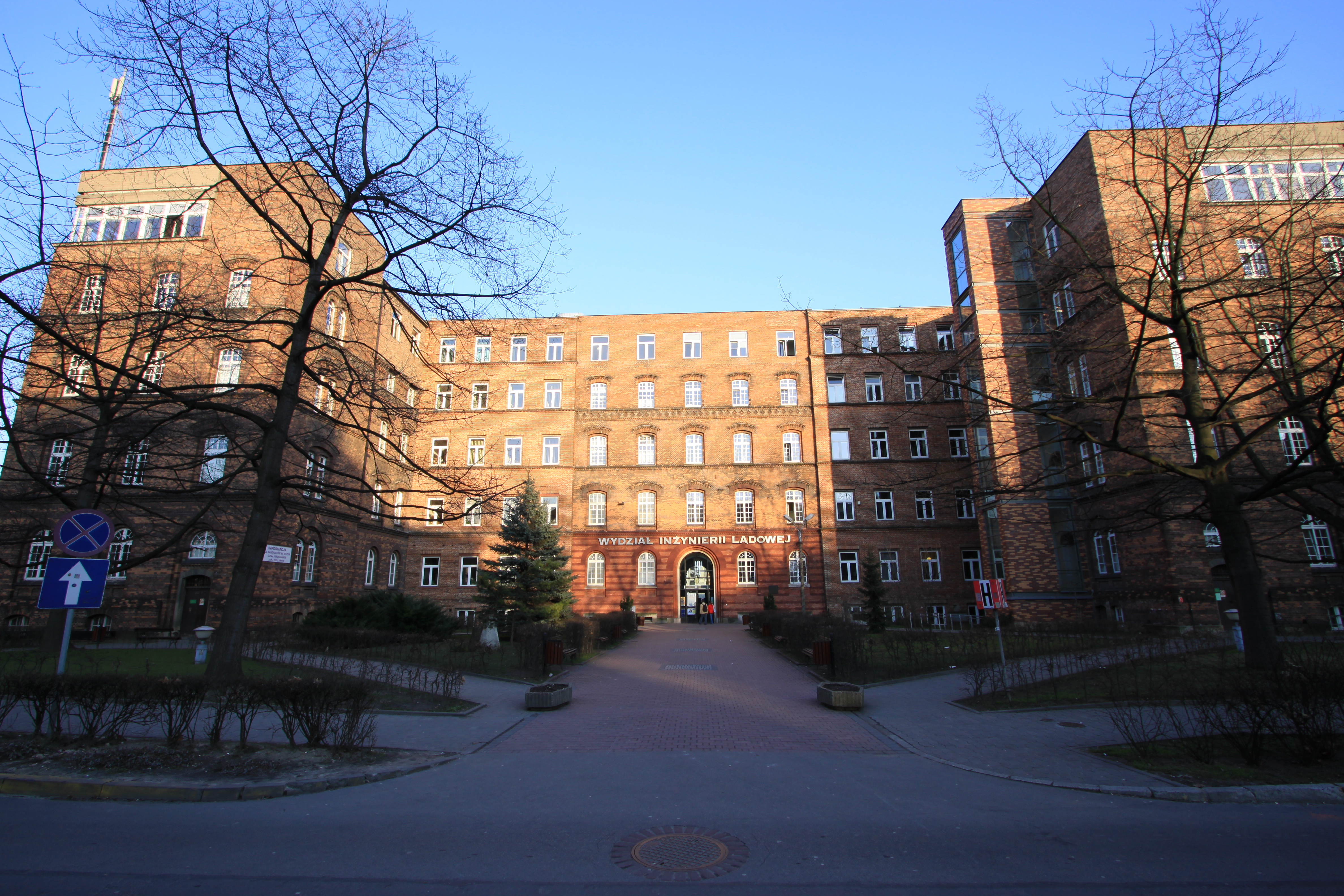 1Politechnika Krakowska, Wydział Inżynierii Lądowej